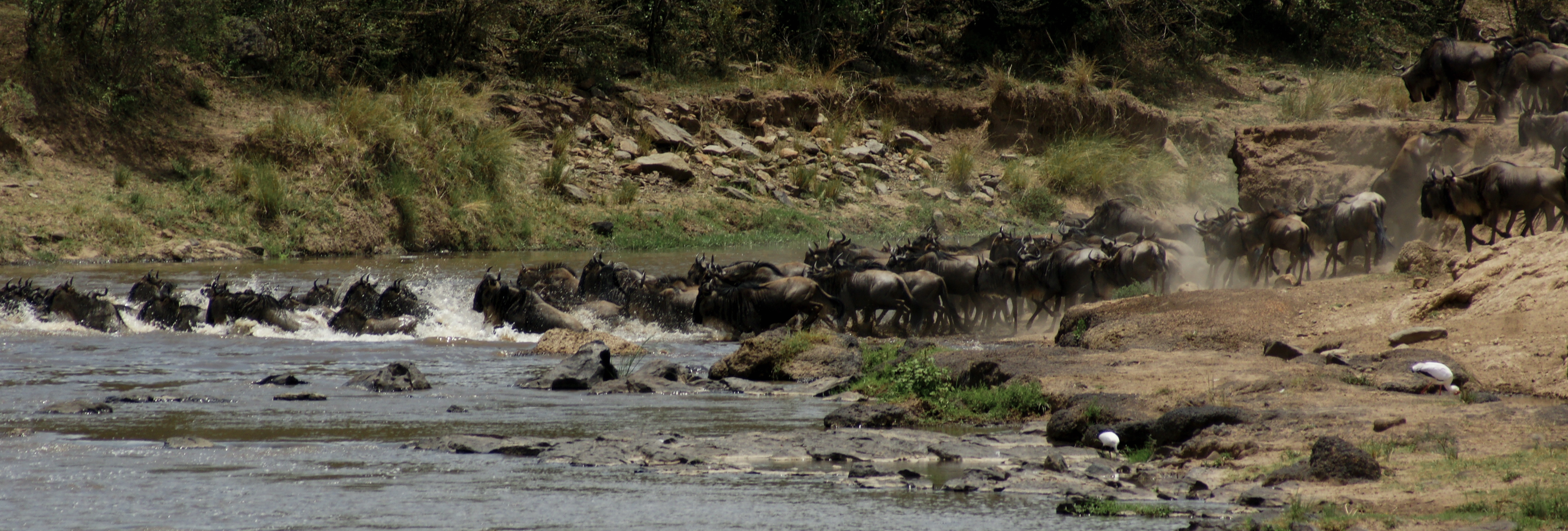 Maasai Mara - 057